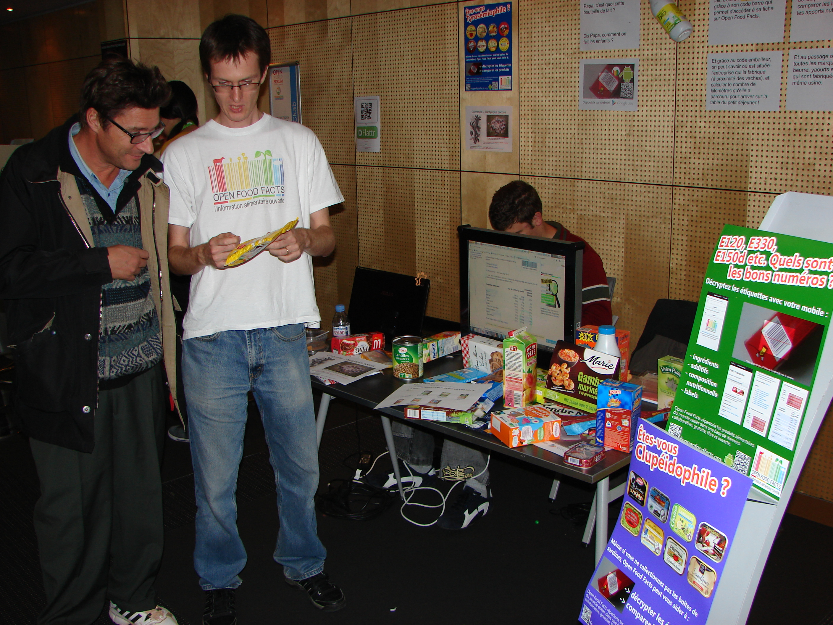 Stéphane Gigandet, présentant Open food facts, à l'Open World Forum